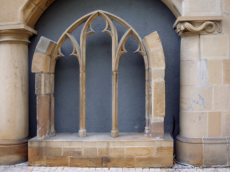 Fensterbogen des ehemaligen Franziskanerklosters, verwahrt am Fleischhaus in Heilbronn